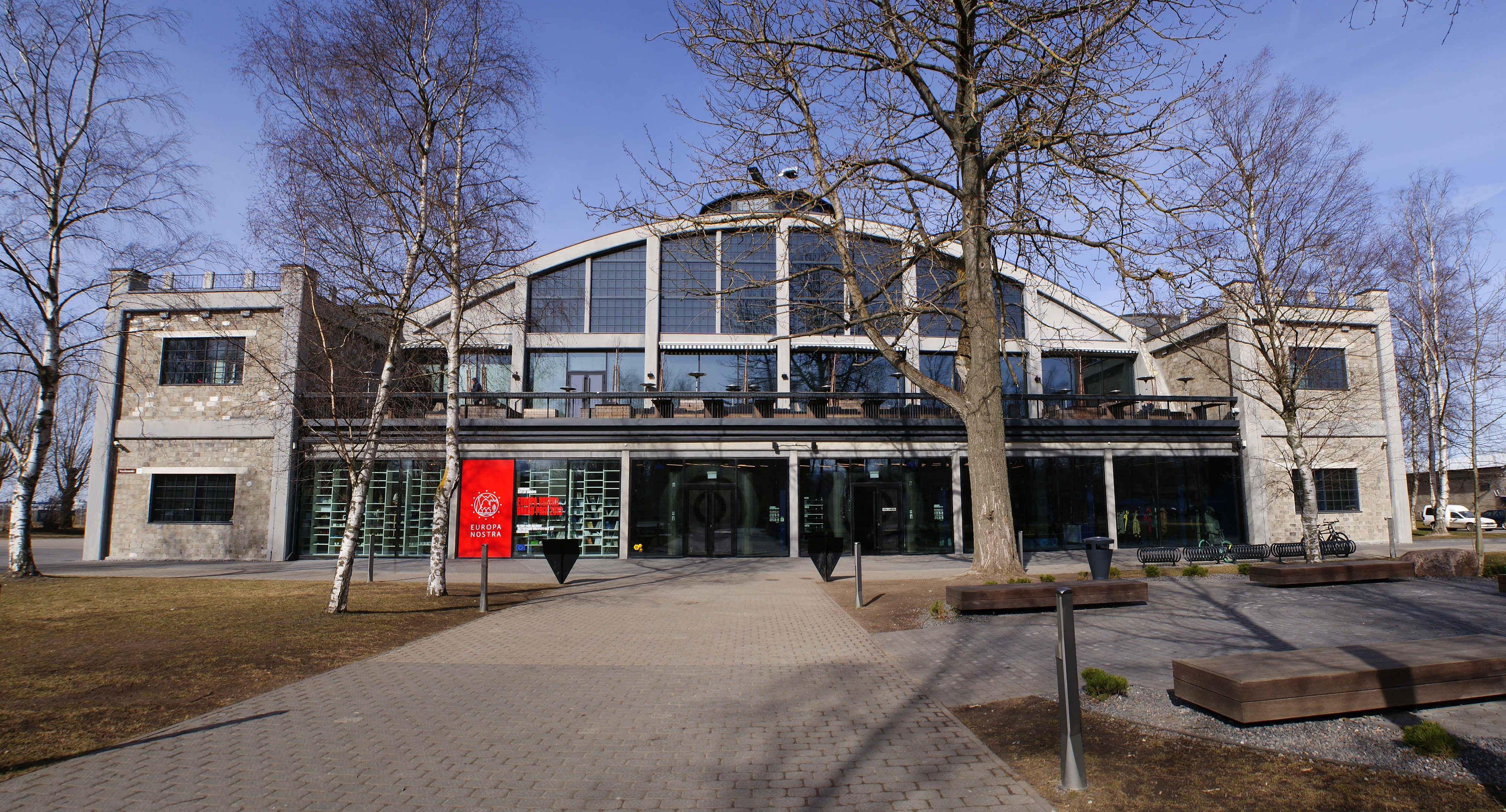 Vesilennukite angaarid